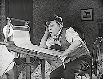 Photo de Charley Bowers, acteur et réalisateur, génie de la poésie cinématographique, il créé des films muets dans la première moitié du XXème siècle. Connu en France sous le nom de Bricolo.